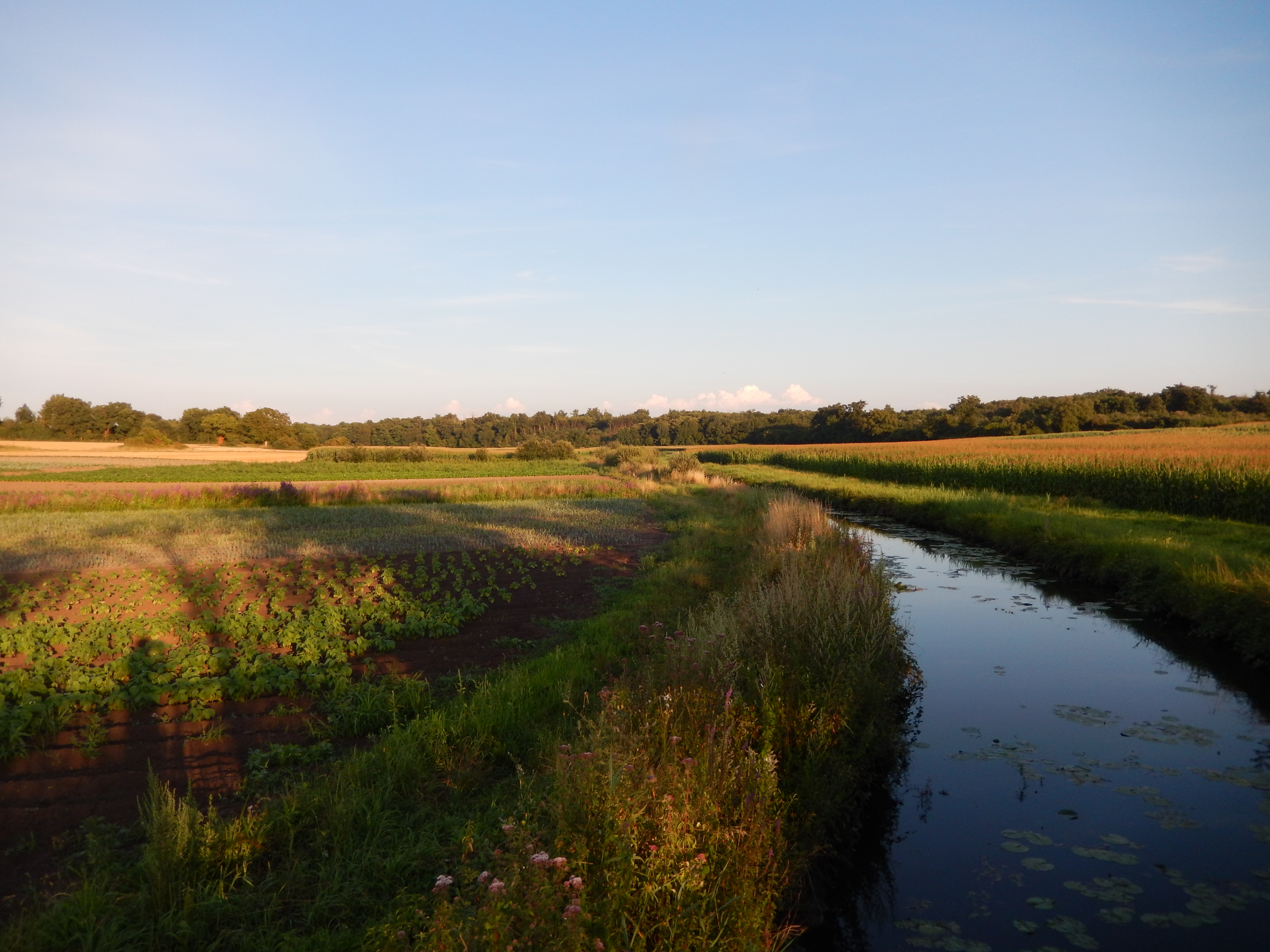 La rivière Arnoult, à hauteur du hameau de Brandet (commune de Soulignonne, Charente-Maritime, France). À gauche, on peut voir une parcelle où sont cultivés des haricots.